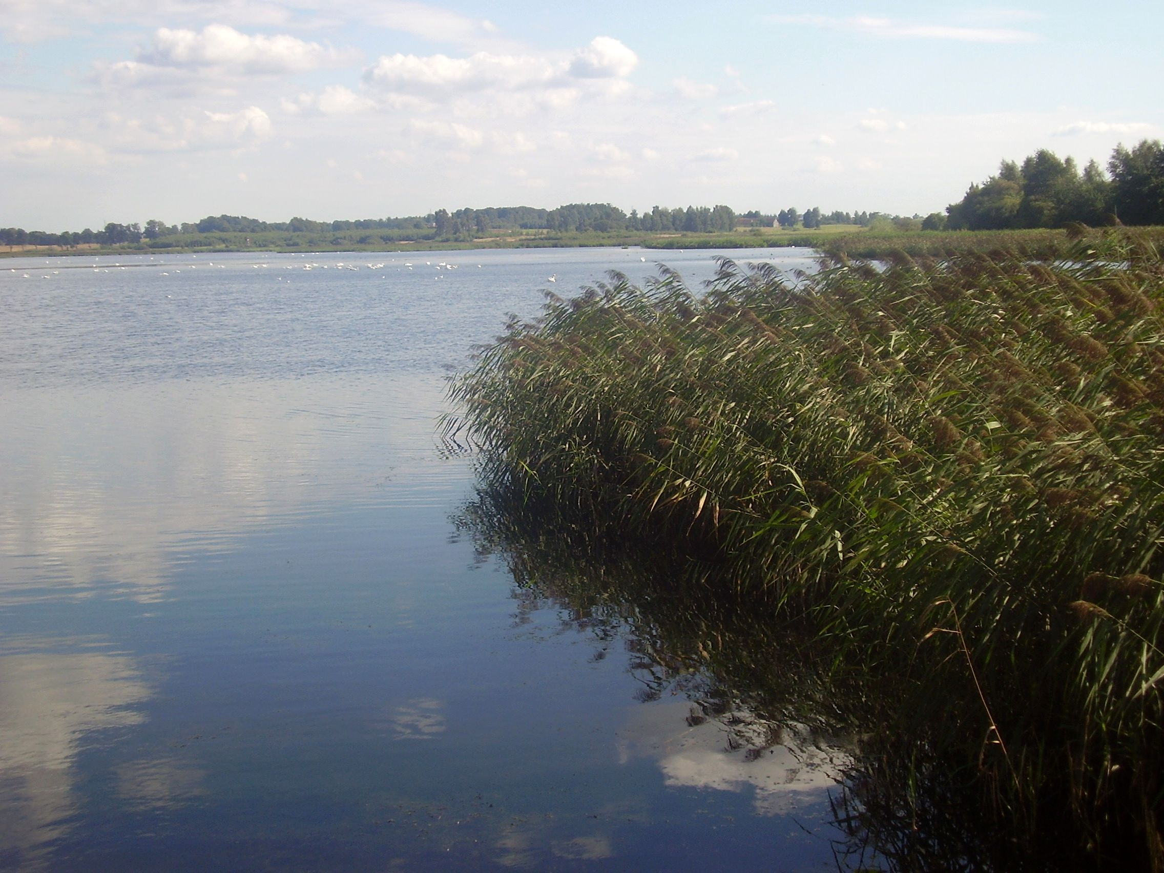 Ostoja ptactwa wodnego na morąskim rozlewisku